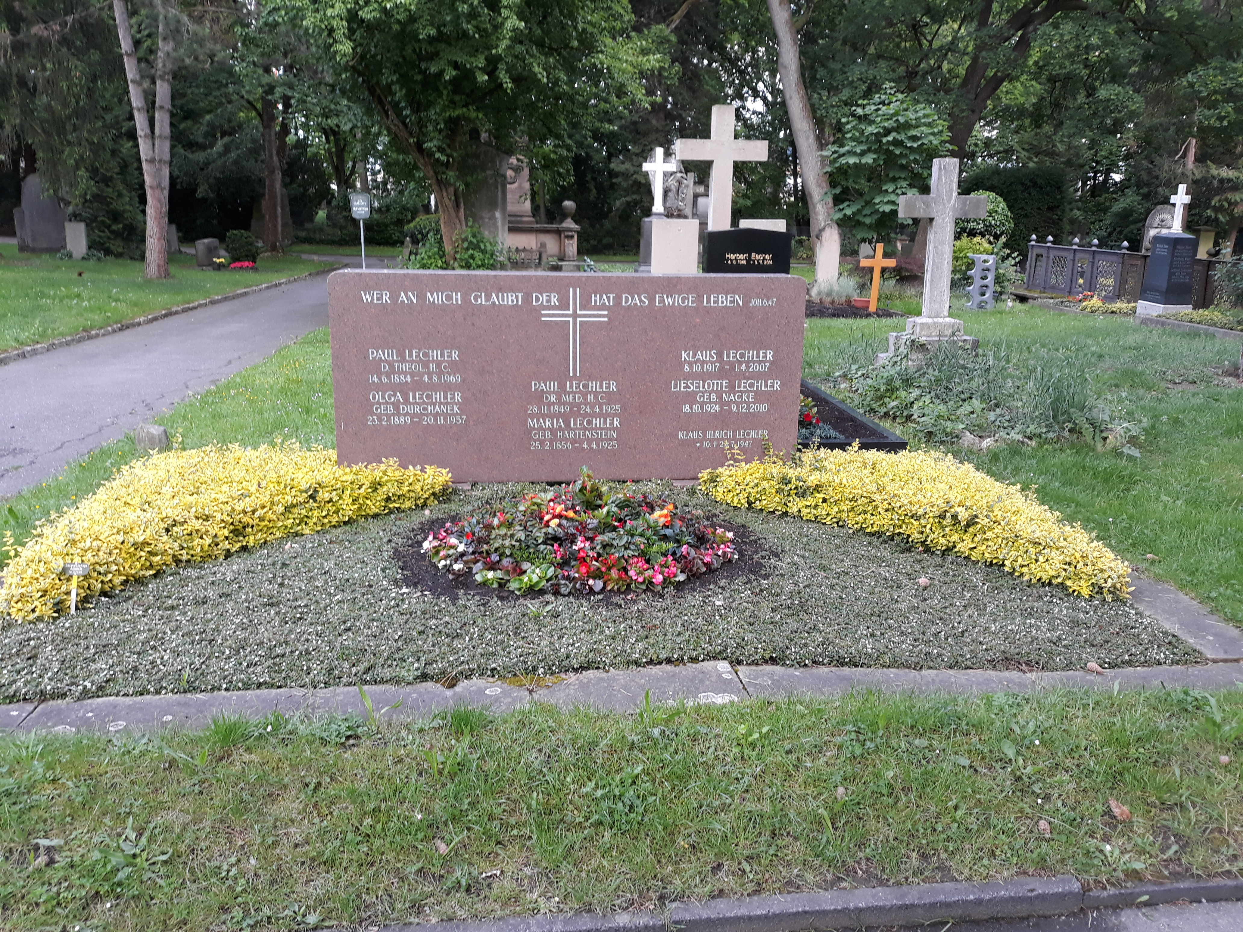 Das Grab der Unternehmerfamilie Lechler auf dem Pragfriedhof Stuttgart. Dort liegen Paul Lechler und sein Sohn Paul begraben.